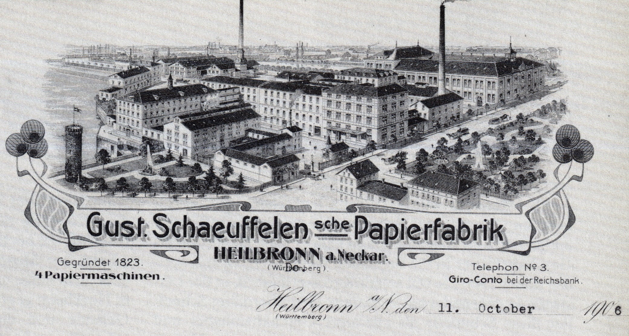 Briefkopf der Gust. Schaeuffelenschen Papierfabrik in Heilbronn